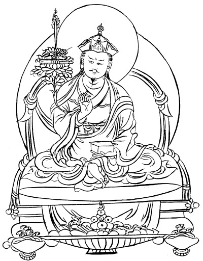 Чогьюр Лингпа